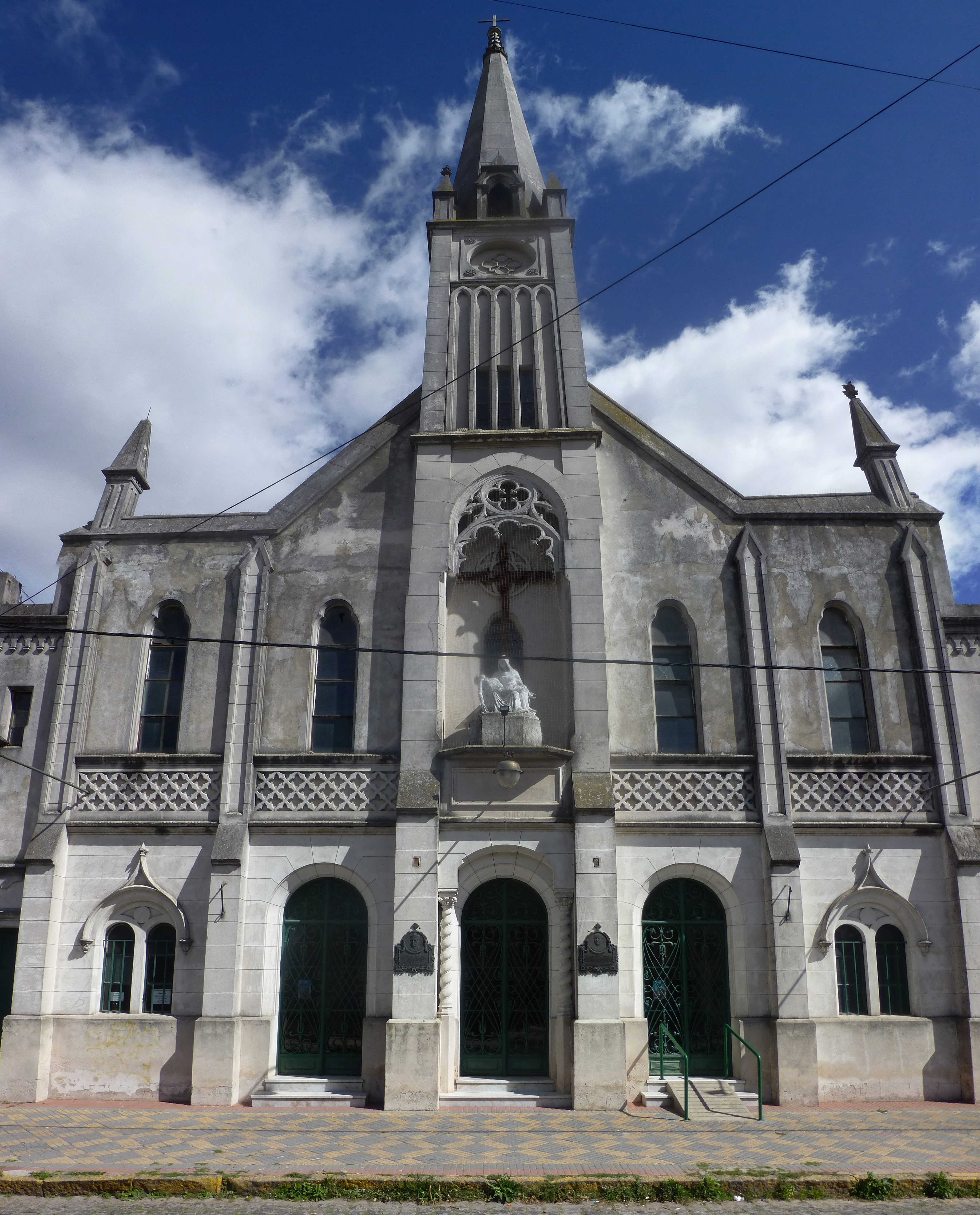 Parroquia Nuestra Señora de la Piedad. Ubicada en Espora 153, Temperley.